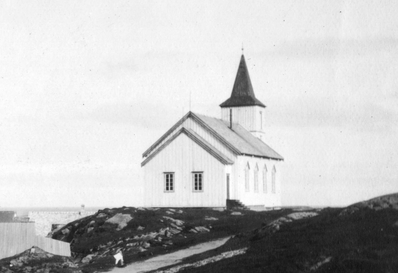 Ingøy kirke, Måsøy